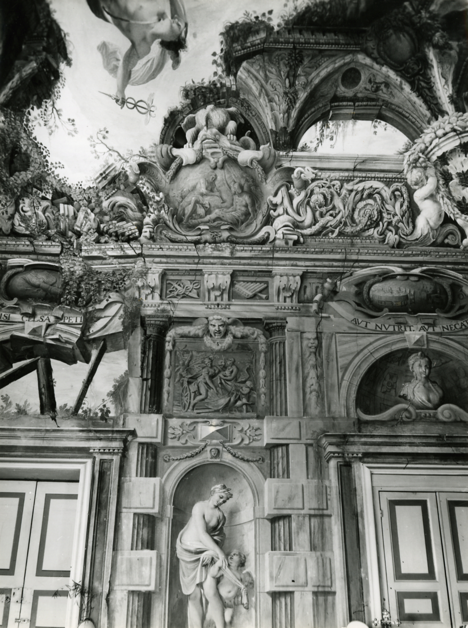 Servizio fotografico : Genova, 1963 / Paolo Monti. - Stampe: 6 : Positivo b/n, gelatina bromuro d'argento/ carta, 24x30. - ((Al verso delle stampe manoscritti i numeri dei negativi corrispondenti: 6272 (lo stesso numero identifica 2 stampe - 2 copie), 6273 (lo stesso numero identifica 2 stampe - 2 copie), 6274 (lo stesso numero identifica 2 stampe - 2 copie); iscrizioni didascaliche con numero di pagina del catalogo in cui la fotografia è stata pubblicata (e, per una stampa, la dicitura "Inedita") e timbro a inchiostro con copyright: "© - Credit to:/ Paolo Monti/ Via T. Tasso [...]/ Milano [...]". - Sul coperchio della scatola iscrizione didascalica manoscritta a pennarello nero: "Genova/ Bologna". - Il negativo identificato con il numero 46397 è stato realizzato per Zodiac. - Occasione: Documentazione per la pubblicazione: Italia Nostra (a cura di), "Le ville genovesi", catalogo della mostra, Genova 1962, Genova, Comune di Genova, 1967. - Fonte: Rubrica di Paolo Monti: Archivio fino 1-4-1961/ 31-3-1963 (1961-1963), presso Archivio Paolo Monti. - Fonte: Agenda di Paolo Monti: R 1 - Monti/ 1 aprile 1963 - 6 giugno 1964/ 6000-8193 (1963-1964), presso Archivio Paolo Monti. - Fonte: Monografia di Italia Nostra (a cura di): Le ville genovesi, catalogo della mostra, Genova 1962, Genova, Comune di Genova (1967). - Fonte: Lettera di Paolo Monti: I. Carteggi/ Genova - Enrico (1963-1966), presso Archivio Paolo Monti. Camicia con documenti dattiloscritti e manoscritti vari relativi al lavoro eseguito per Italia Nostra: preventivi, lettere, inventari